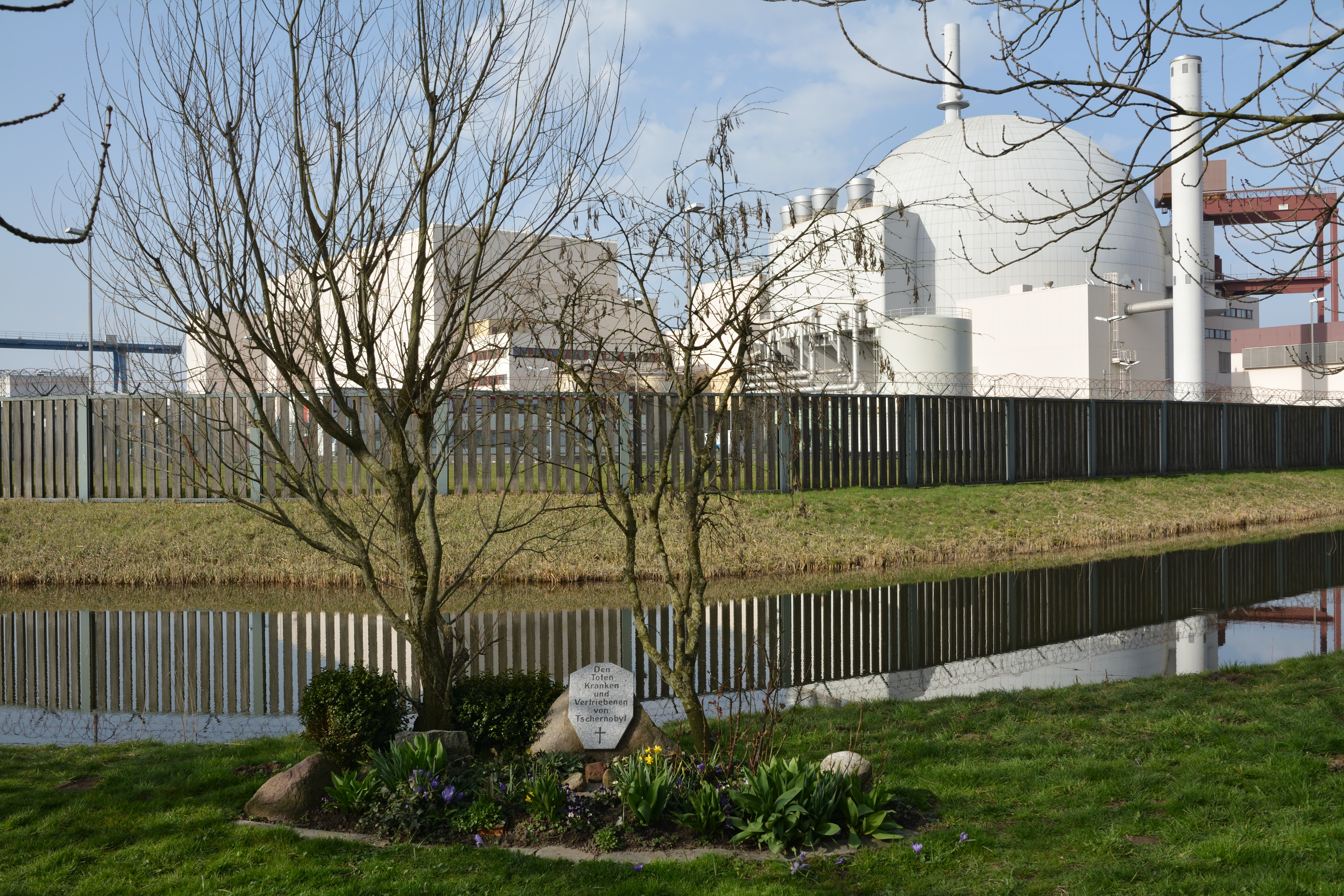 Eine Gedenkstätte an den Nuklearunfall in Tschernobyl am AKW Brokdorf